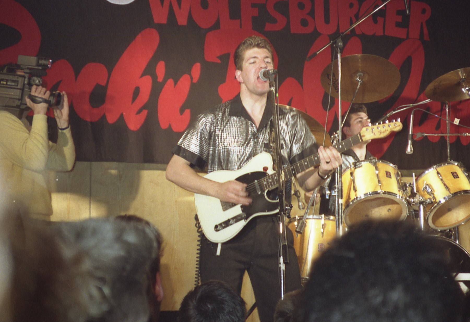 Ray und Tony Cotton bei einem Konzert in Wolfsburg, ca. 1989